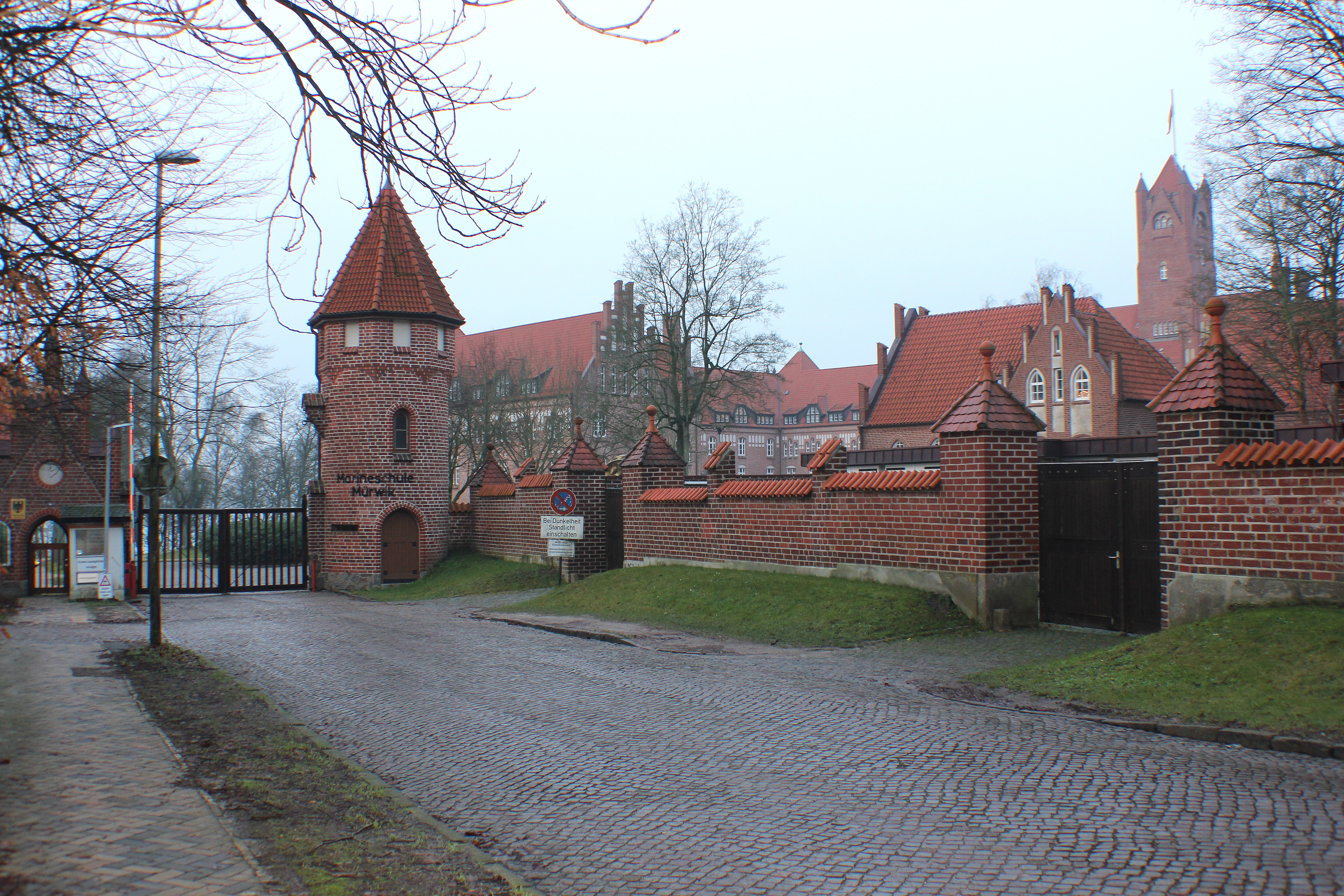 Zugang zum Burgkomplex der Marineschule Mürwik mit Begrenzungsmauer, Flensburg, Kelmstrasse